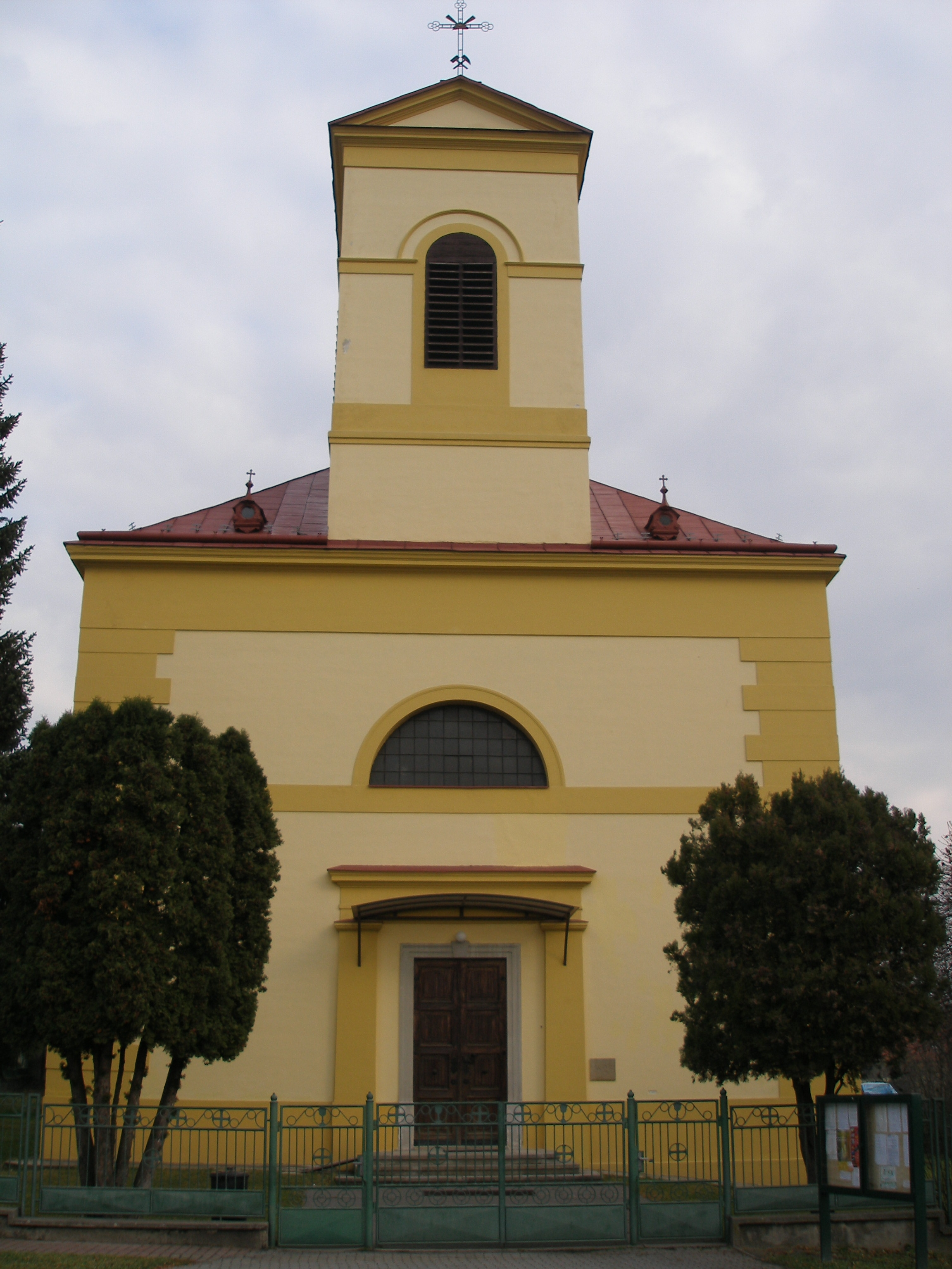 Solivar mestská časť Prešova, kostol Narodenia sv. Jána Krstiteľa